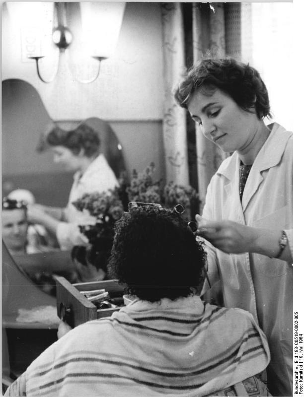 Schmachtenhagen, Blick in den Friseursalon Zentralbild Karnitzki 19.5.1964 Kreis Oranienburg: Frisiersalon in Schmachtenhagen Ein moderner Frisiersalon wurde im vergangenen Jahr in Schmachtenhagen eröffnet. Die Frauen des Dorfes haben dadurch die Möglichkeit erhalten, sich schnell einmal Wellen legen zu lassen.